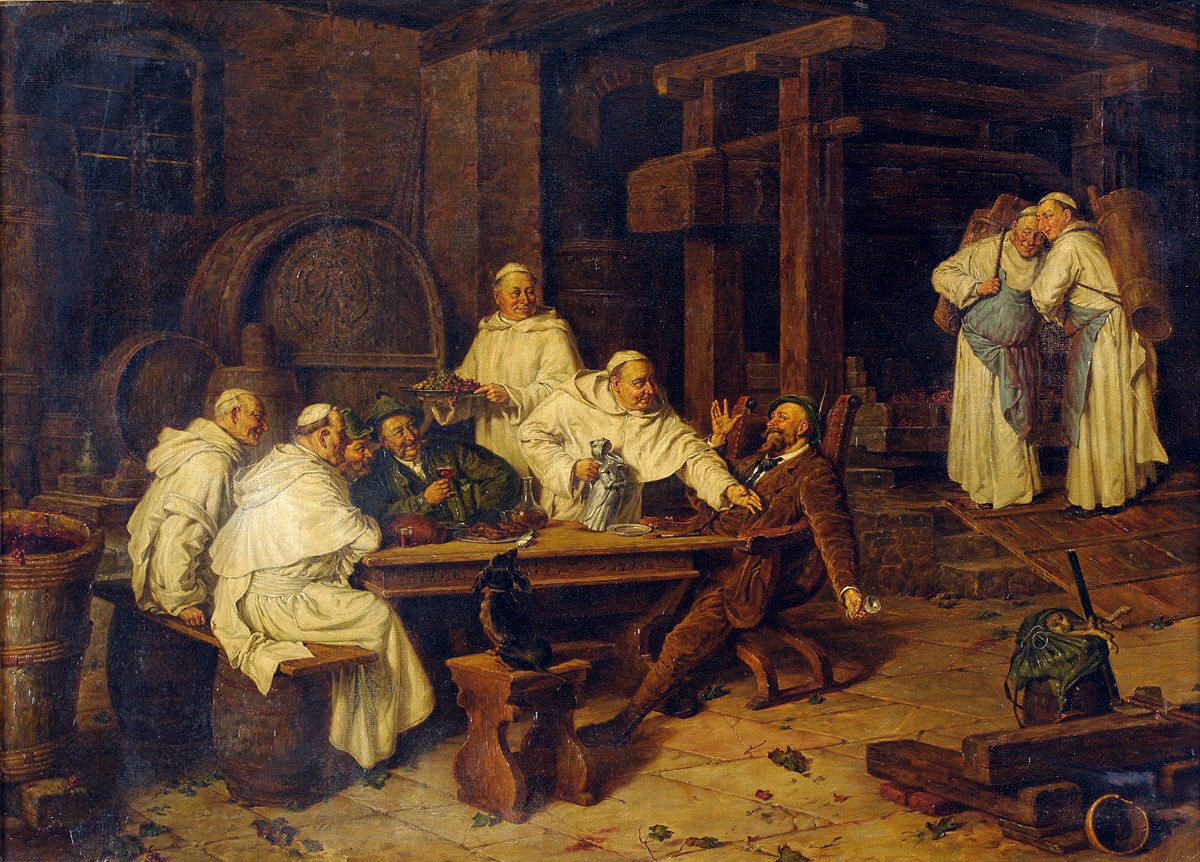 Die Weinprobe. Öl auf Leinwand, 78 x 108 cm. Süddeutscher Meister 19. Jh. (oder frühes 20. Jh.)